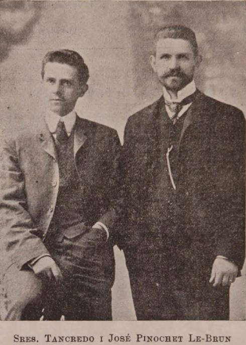 Tancredo, escritor y politico, y José Pinochet Le-Braun, profesor. Fotografia en revista Pluma y Lápiz (1900-1904)